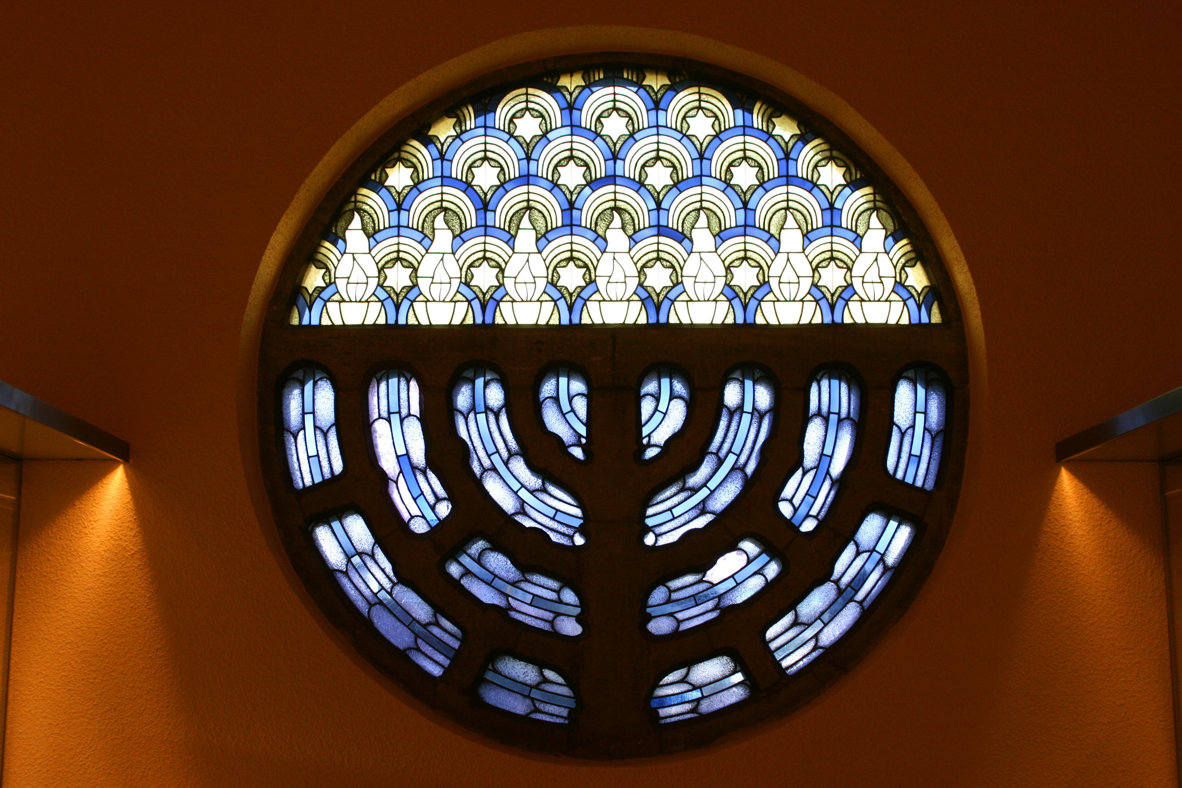 Alte Synagoge, Steeler Straße 29 in Essen